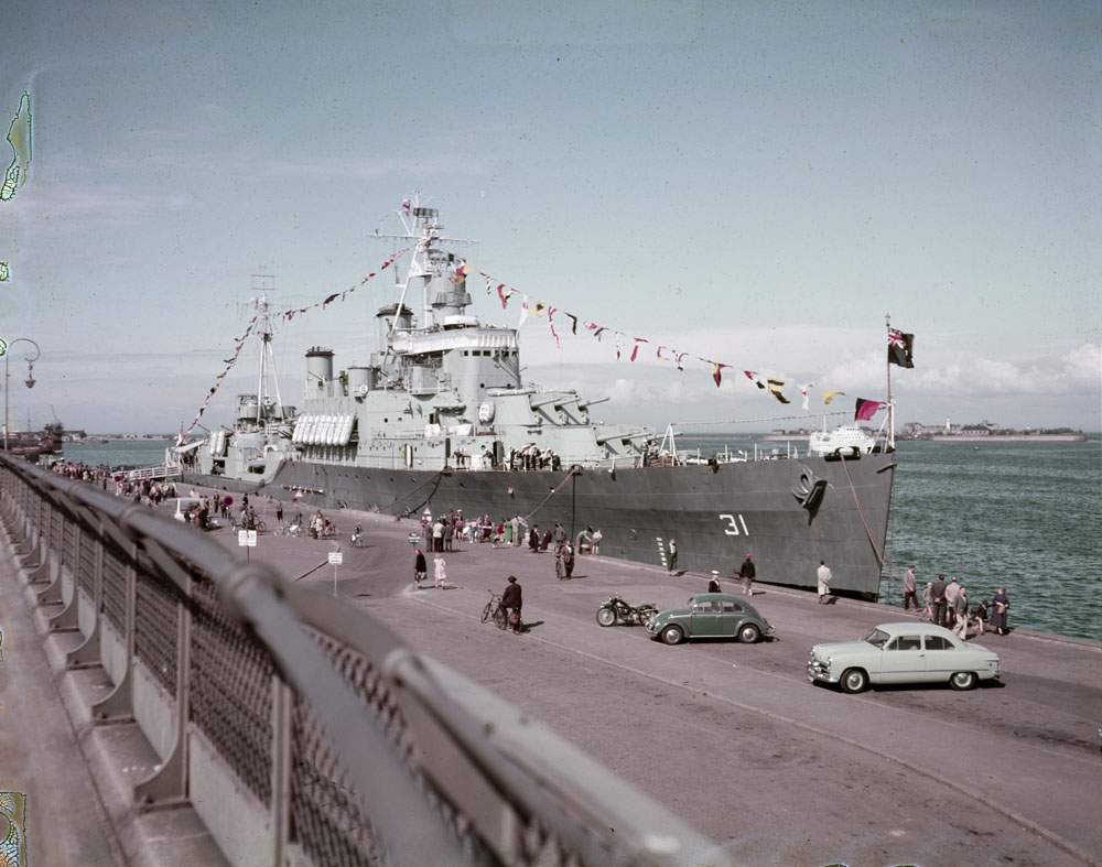 HMCS Quebec in Copenhagen 1954.